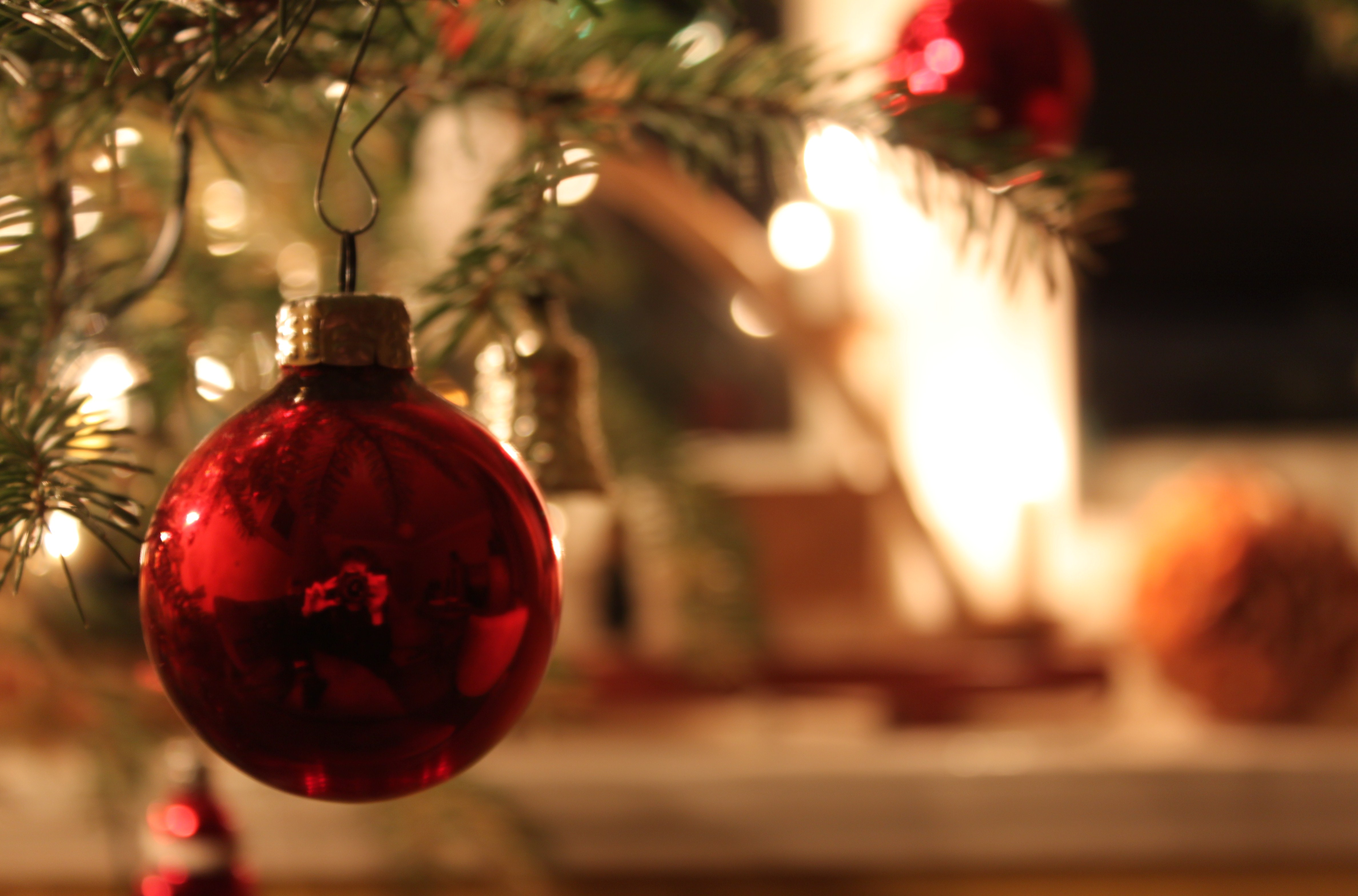 Eine typische Christbaumkugel, am Weihnachtsbaum hängend.